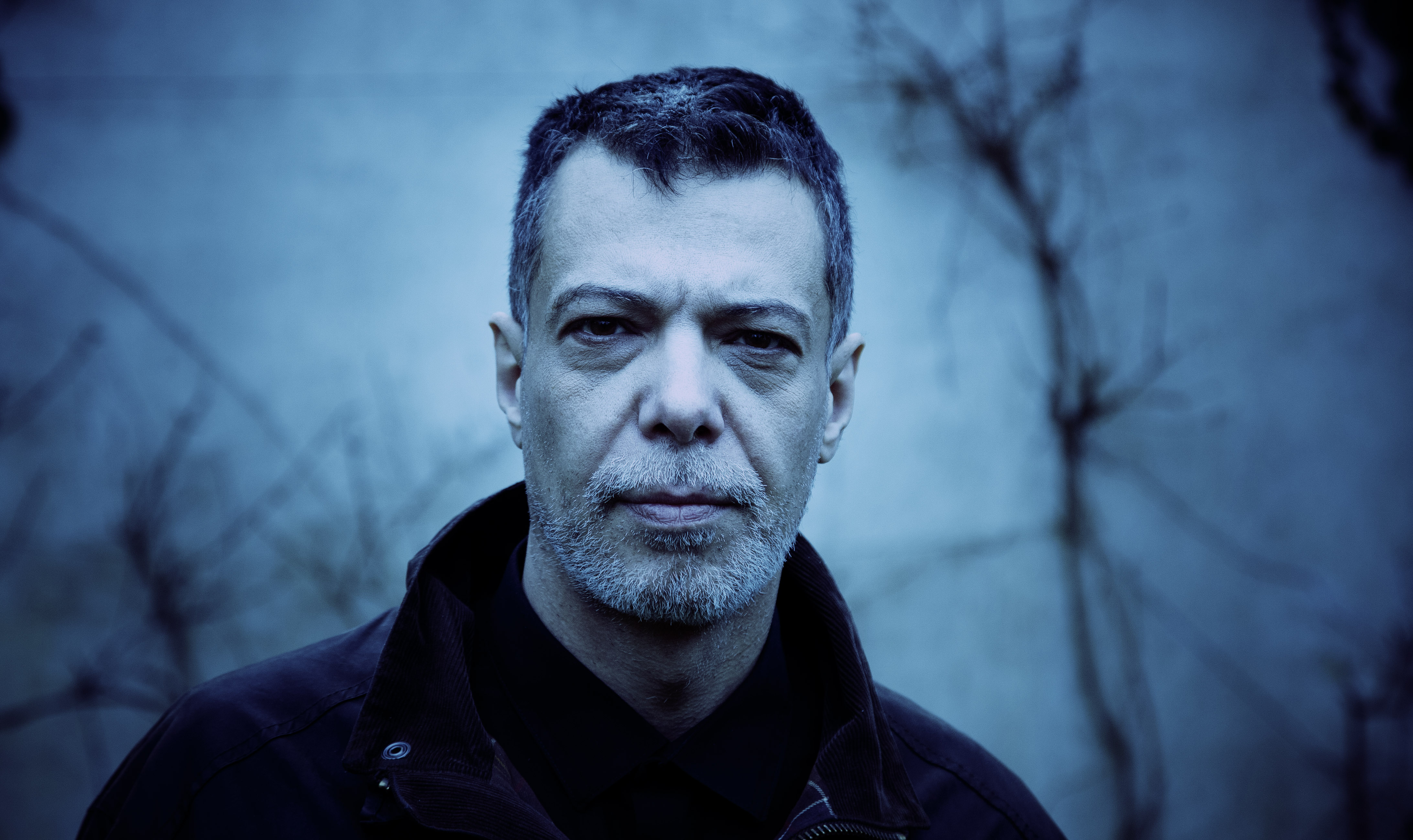 Srpskohrvatski / српскохрватски: author's portrait